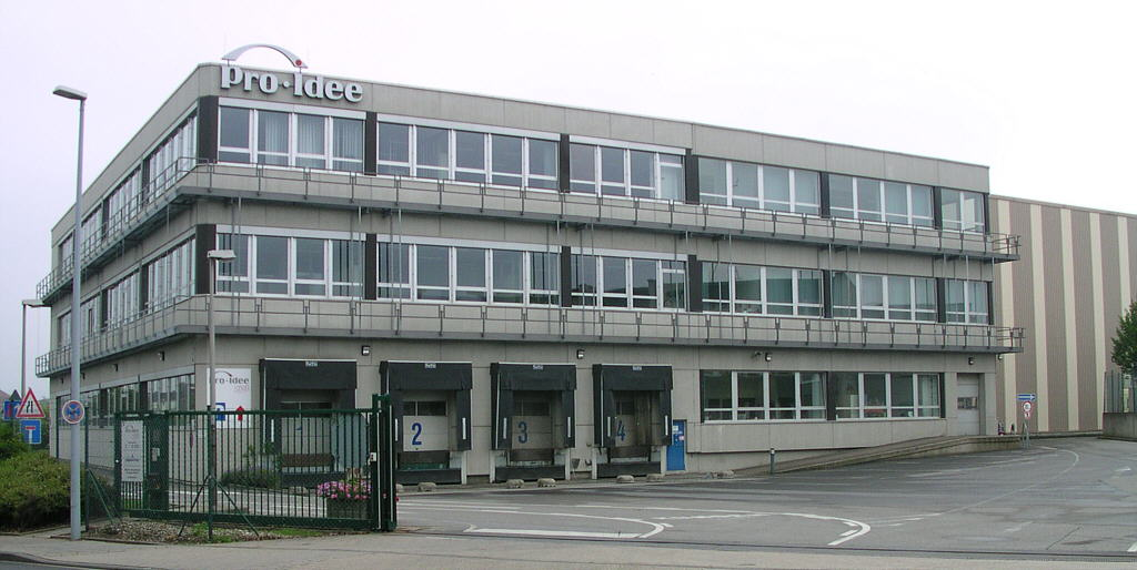 Aachen, Firmengelände Junghans-Wolle pro idee